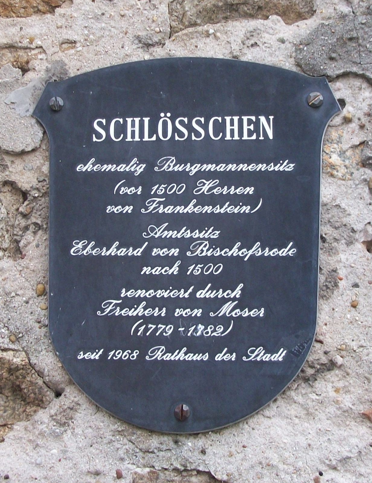 Infotafel am Torbogen